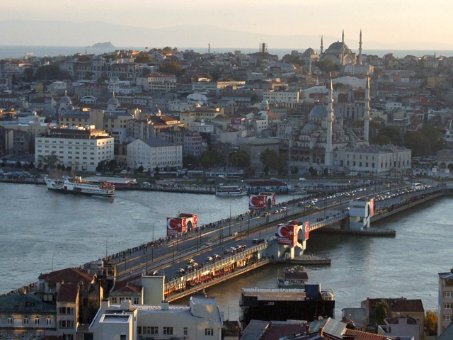 Galata bridge